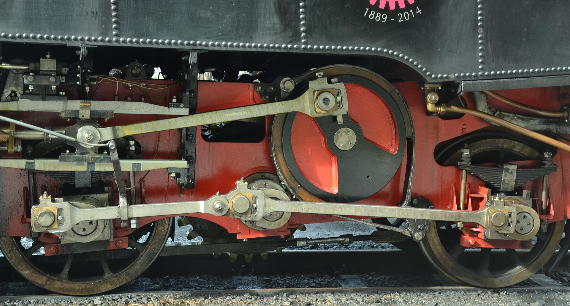 Zahnrad- und Adhäsionstriebwerk der Lok 4 der Achenseebahn mit Bildwelle und Zahnrad in Bildmitte.